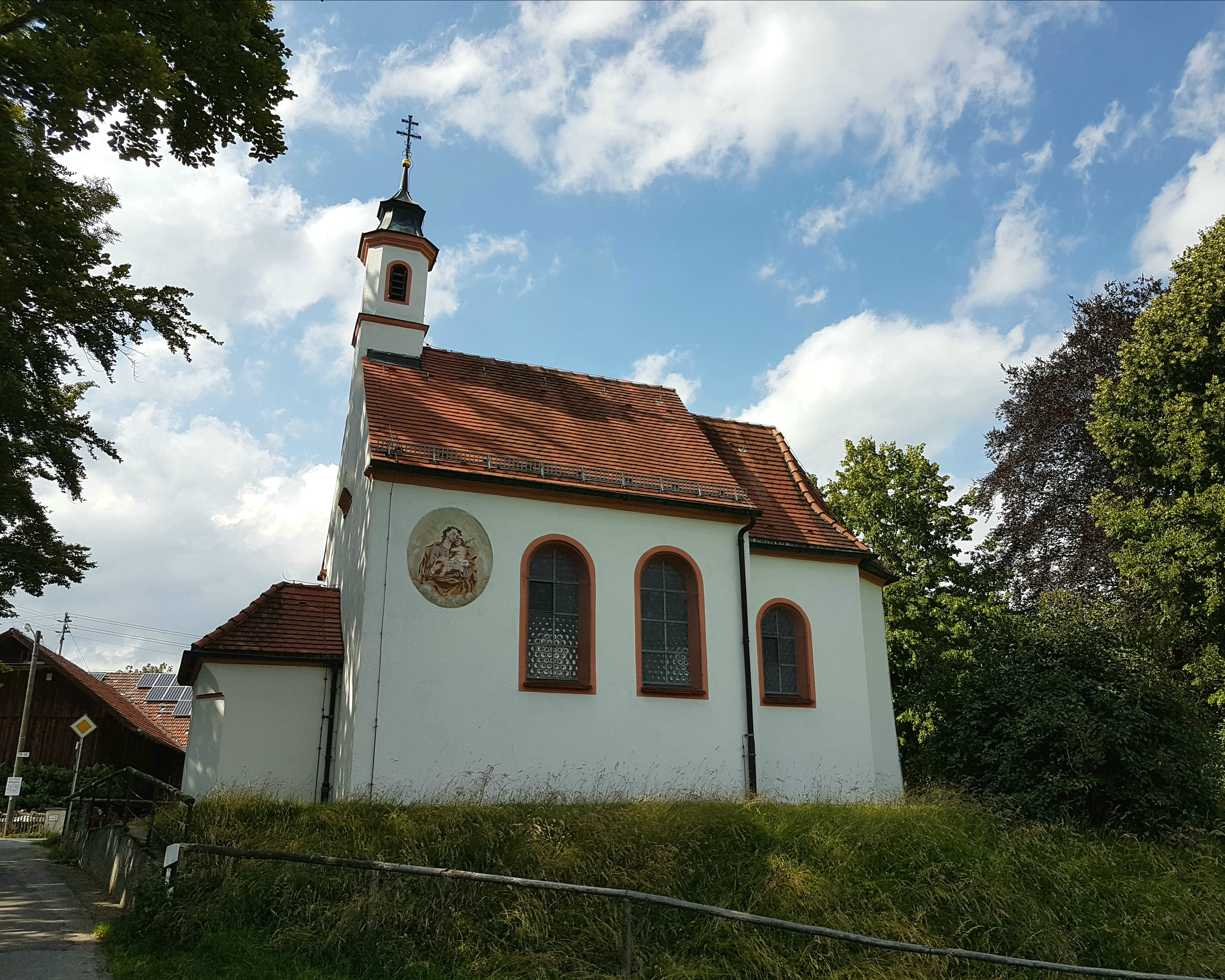 Thannenberg (Bruggen), Kapelle St. Josef